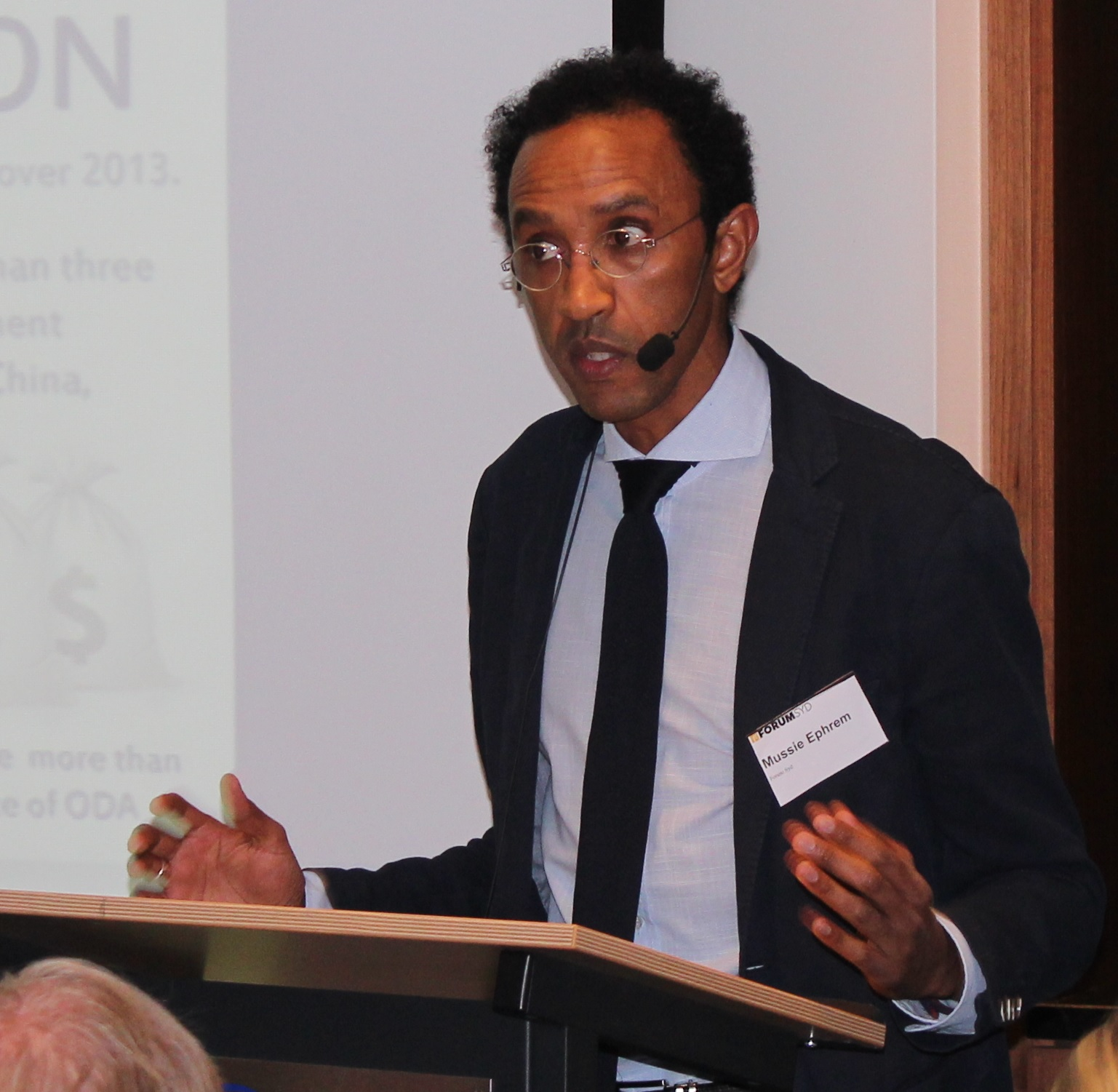 hilton hotel Stockholm slussen